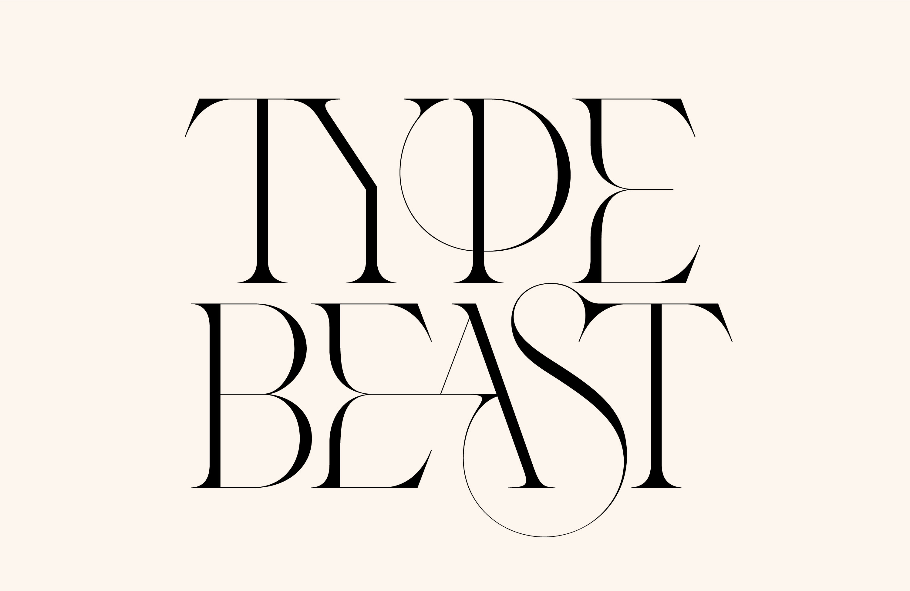 typebeast tipográfia